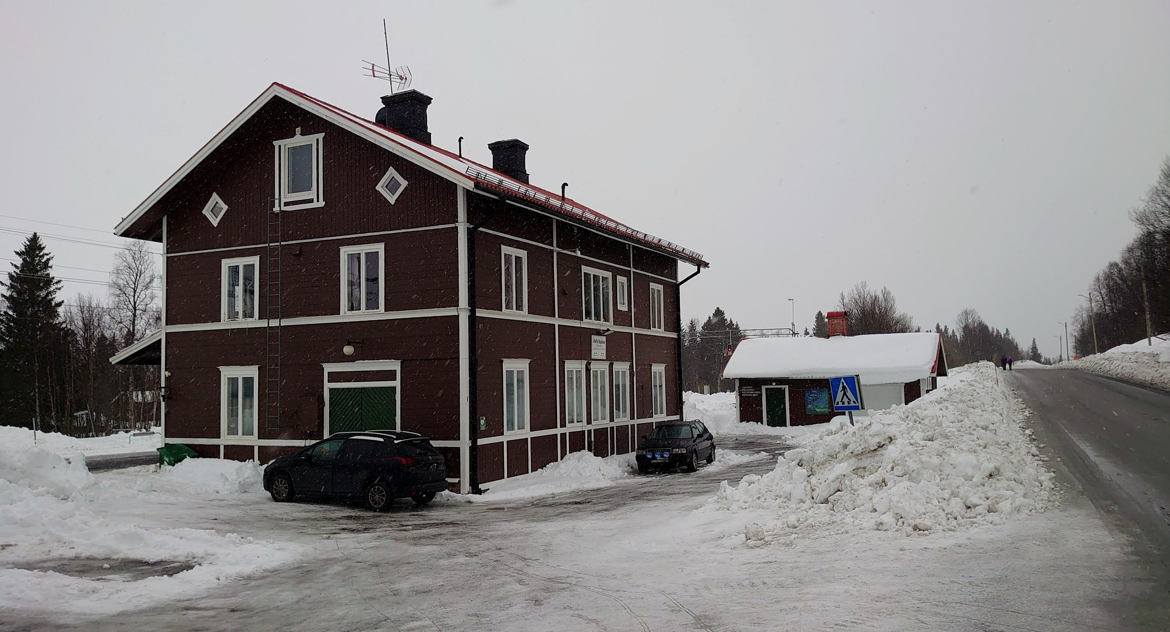 Järnvägsstationen i Ånn i Jämtland